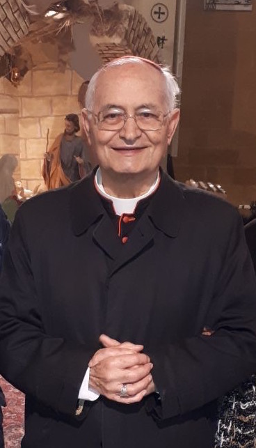 Sua Eminenza il Cardinale Salvatore De Giorgi